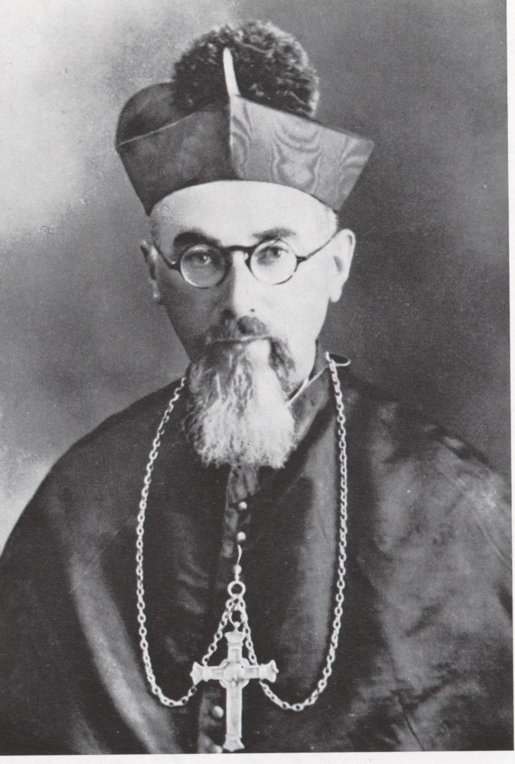 Bischof Karl Christian Weber SVD, China, Bexbach